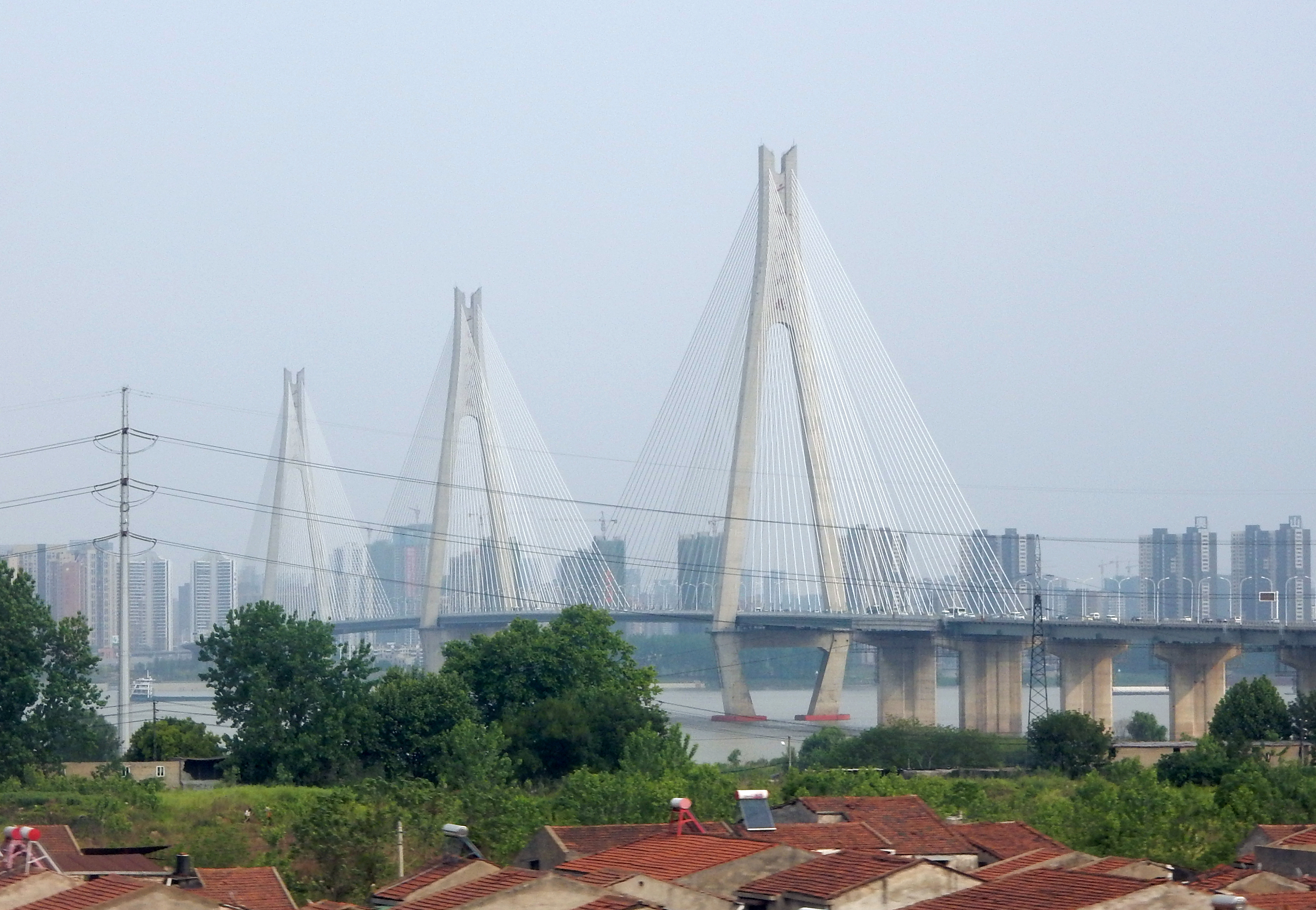 Erqi Yangtze River Bridge 2016_04_19 403d